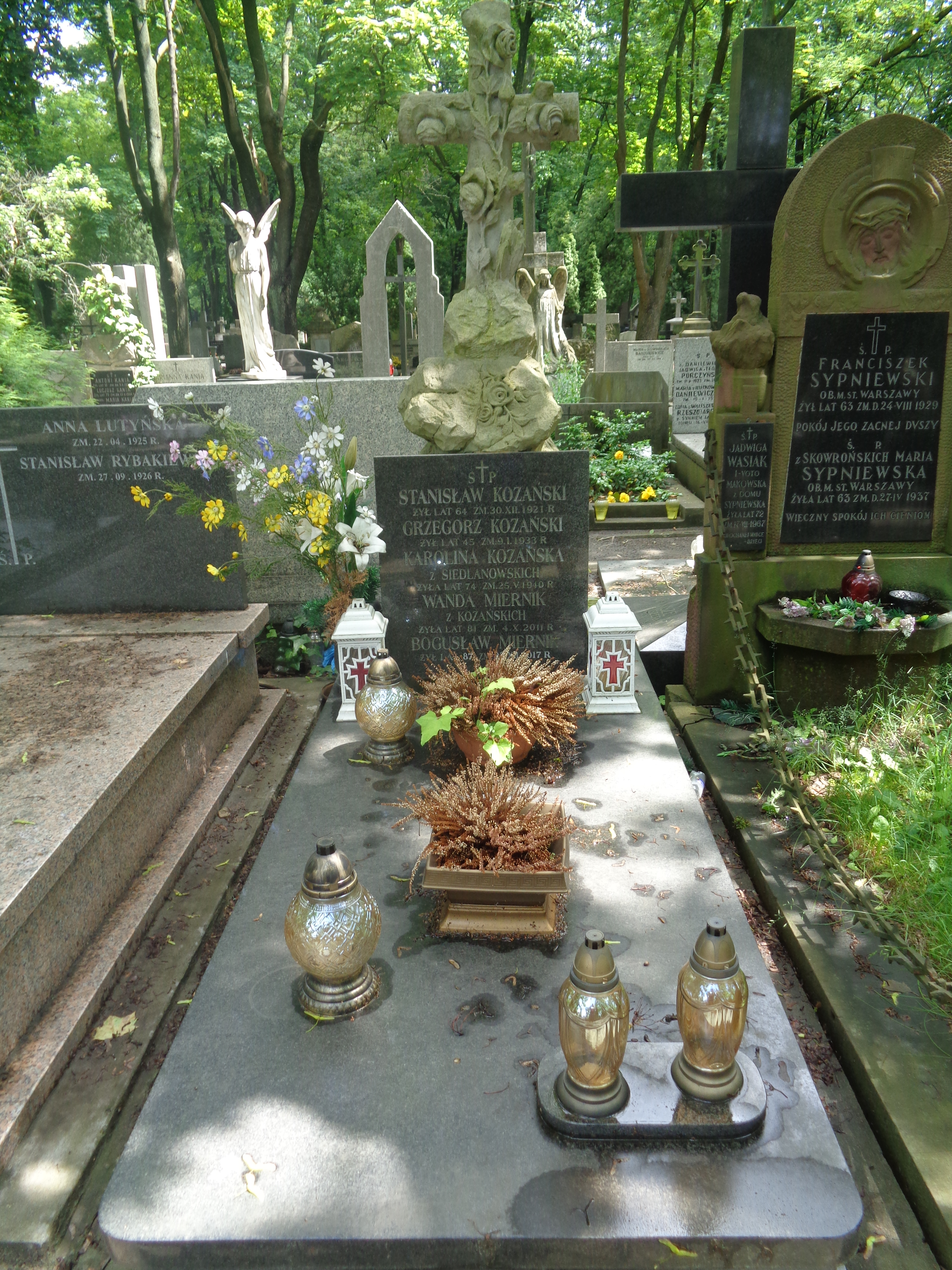 Grób Bogusława Miernika na Cmentarzu Powązkowskim